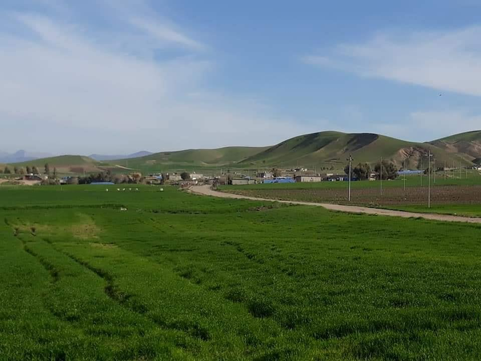 کوردی: گوندی کانی بەردینە